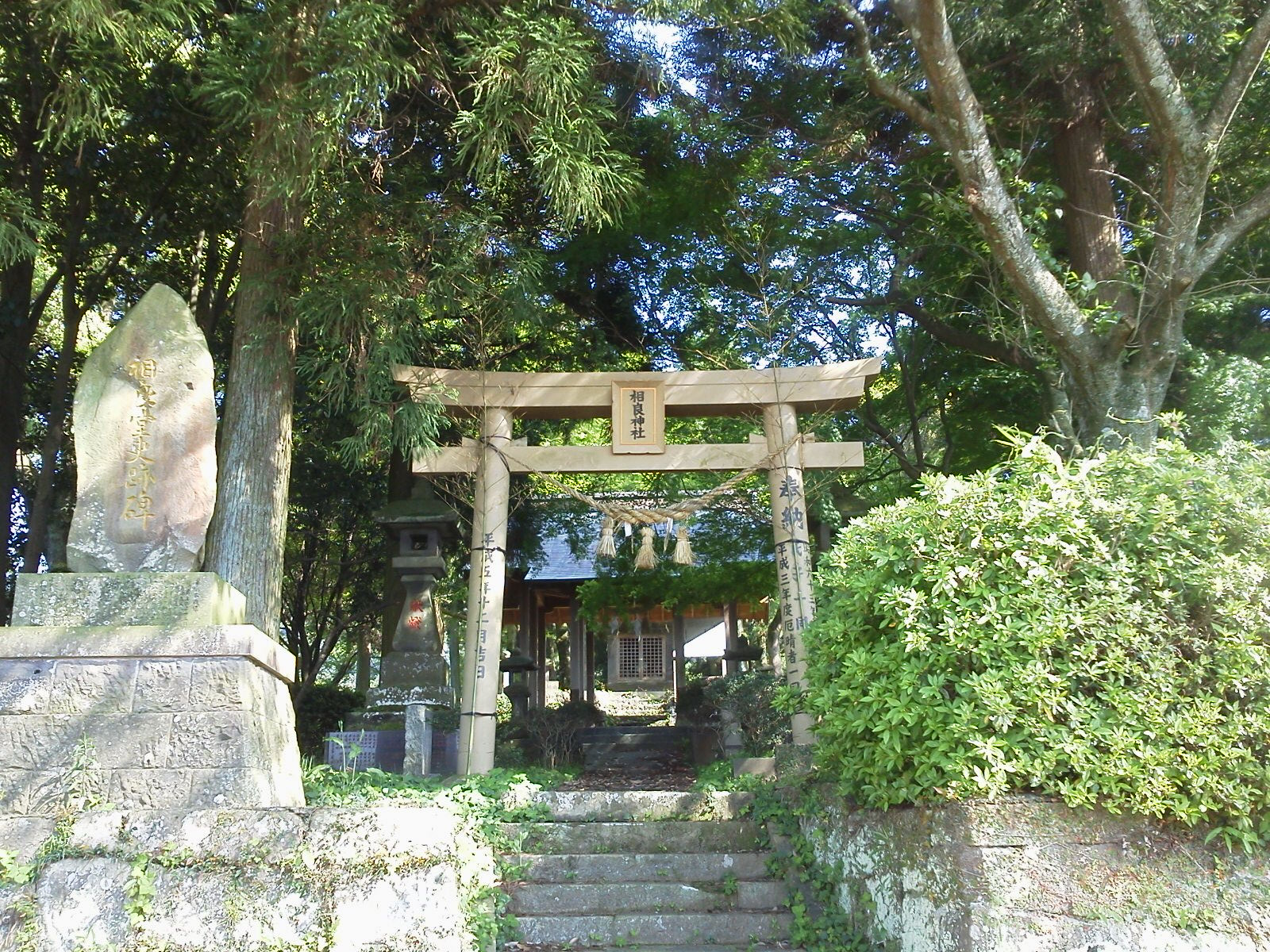 相良神社 (宇城市)